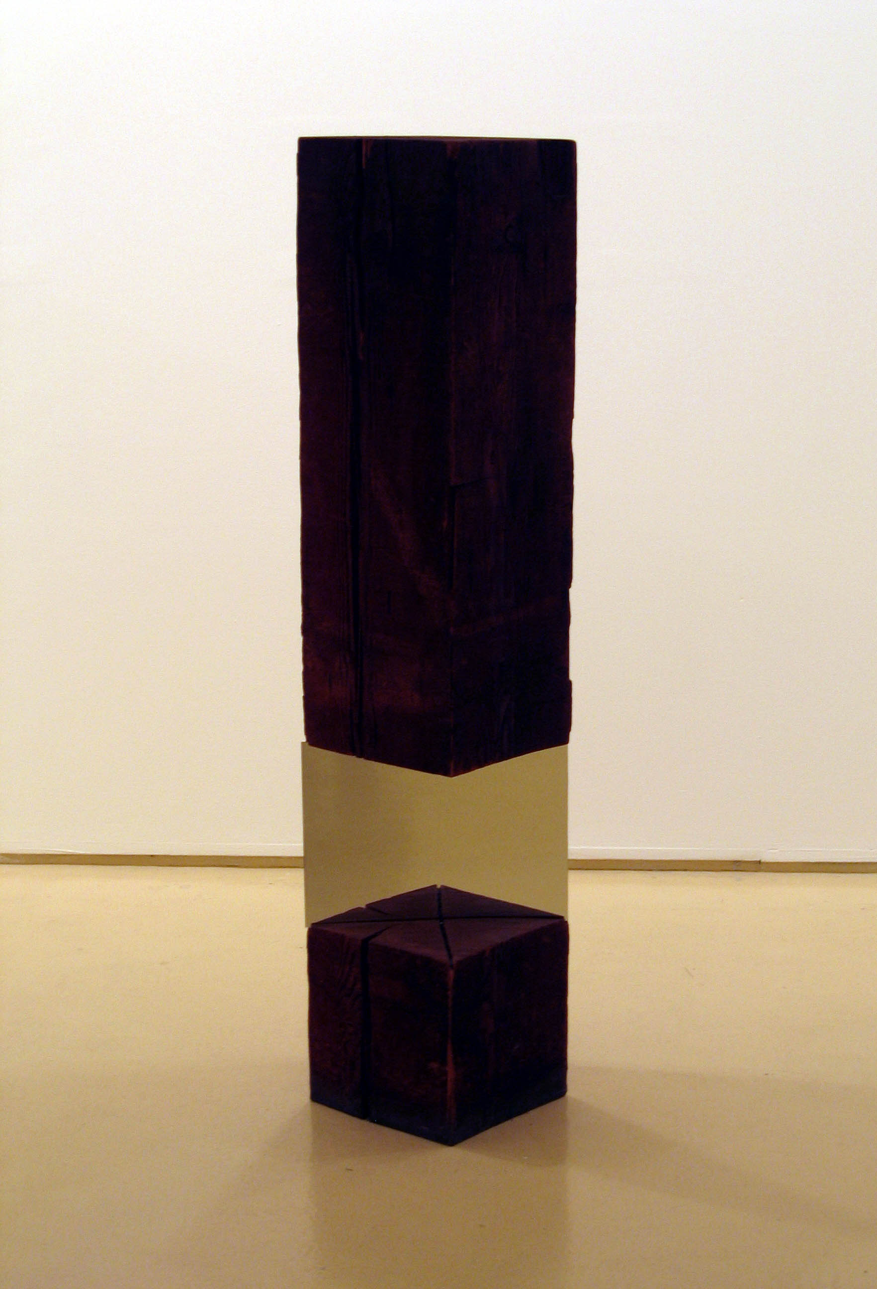 Sculpture